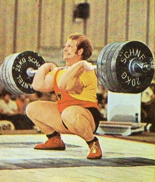 MUNCHEN/MONACO '72-PANINI-Figurina n.51- MANG - BRD -SOLLEVAMENTO PESI-Rec